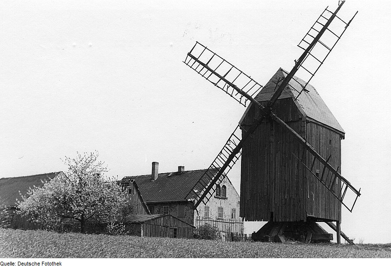 Original image description from the Deutsche Fotothek Liebschützberg-Liebschütz. Bockmühle und Gehöft